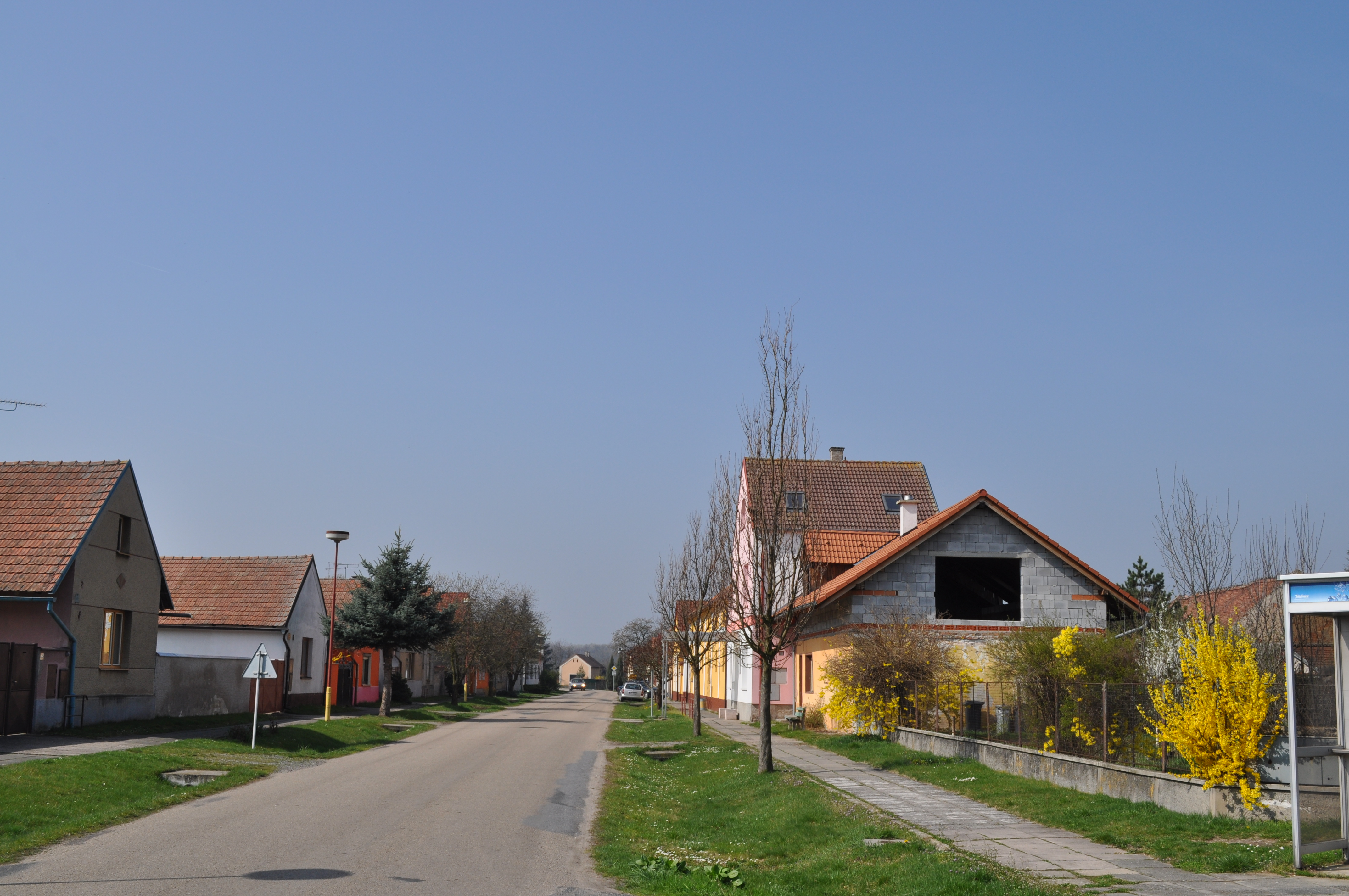 Kanín, Ortsdurchfahrt Strasse Nr. 3283